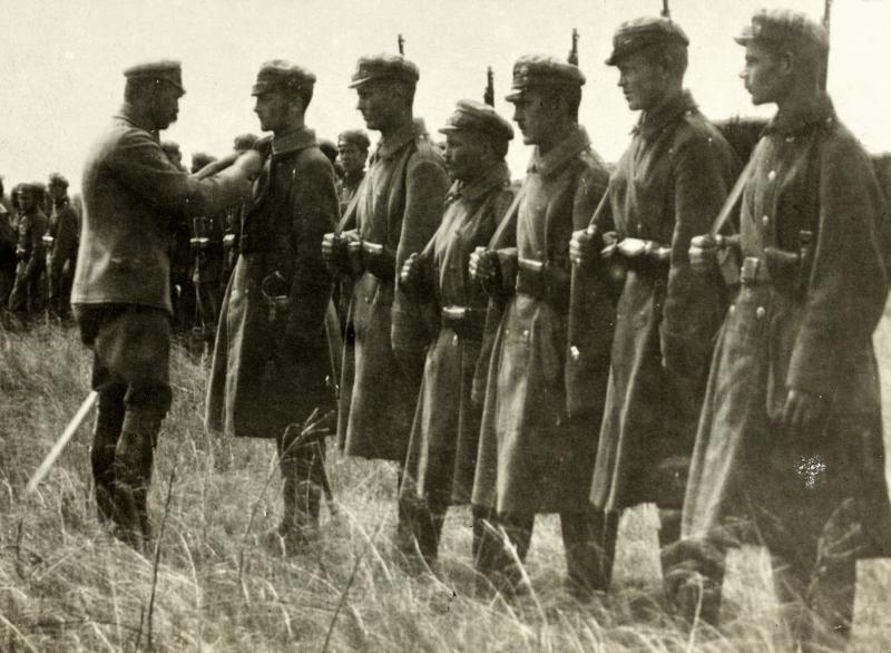 Józef Piłsudski dekoruje legionistów I Brygady odznaką honorową „Za wierną służbę”. 6 sierpnia 1916 roku, pozycje nad Stochodem.